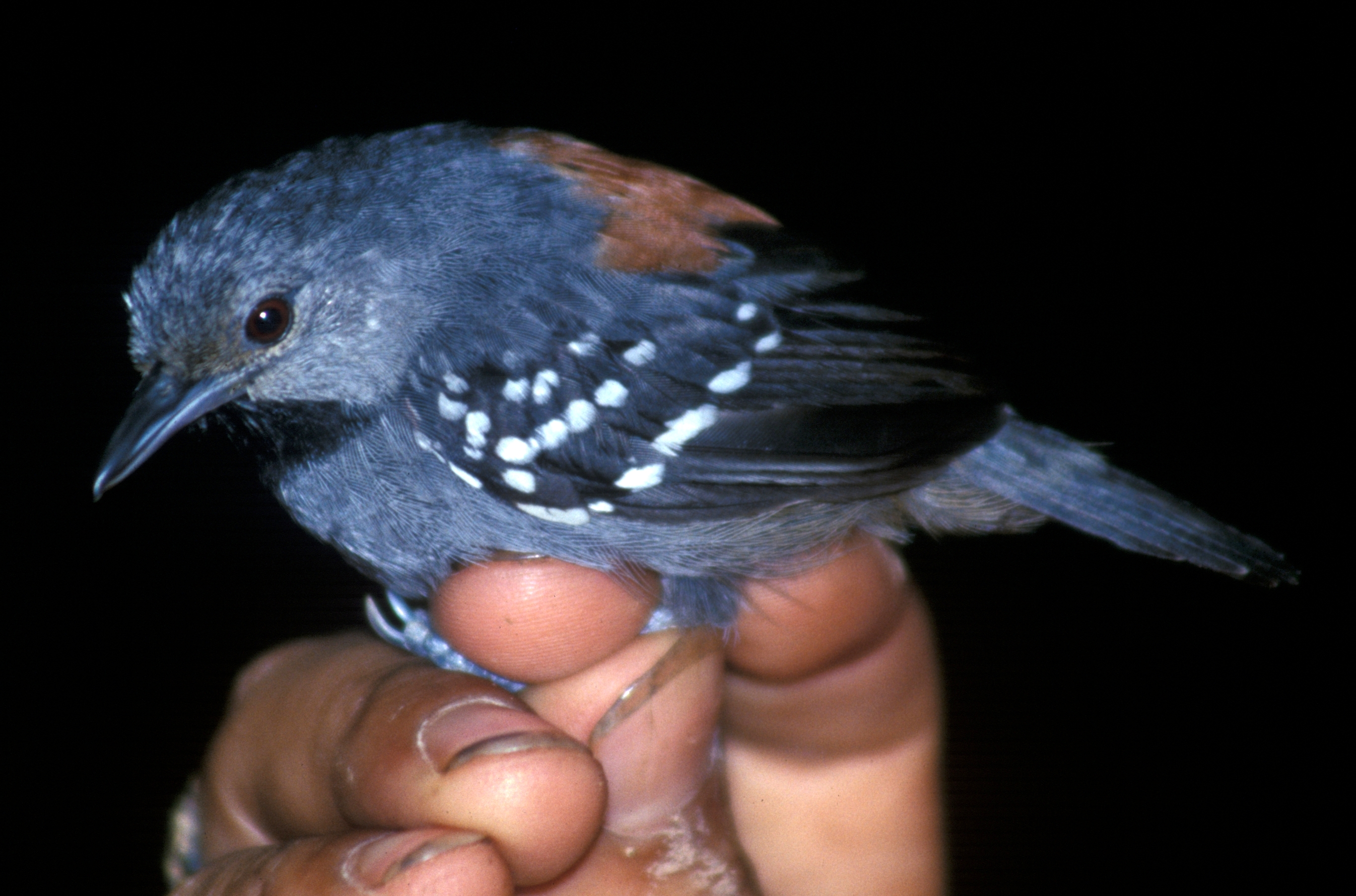 Ornate Antwren (Epinecrophylla ornata). Male from Cordillera del Cóndor, Ecuador.